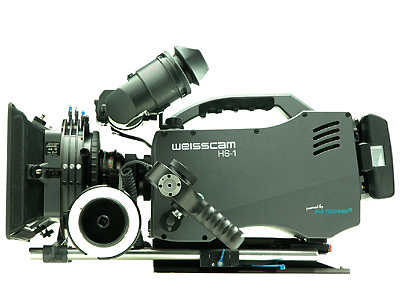 Bild der Kamera WEISSCAM HS-1